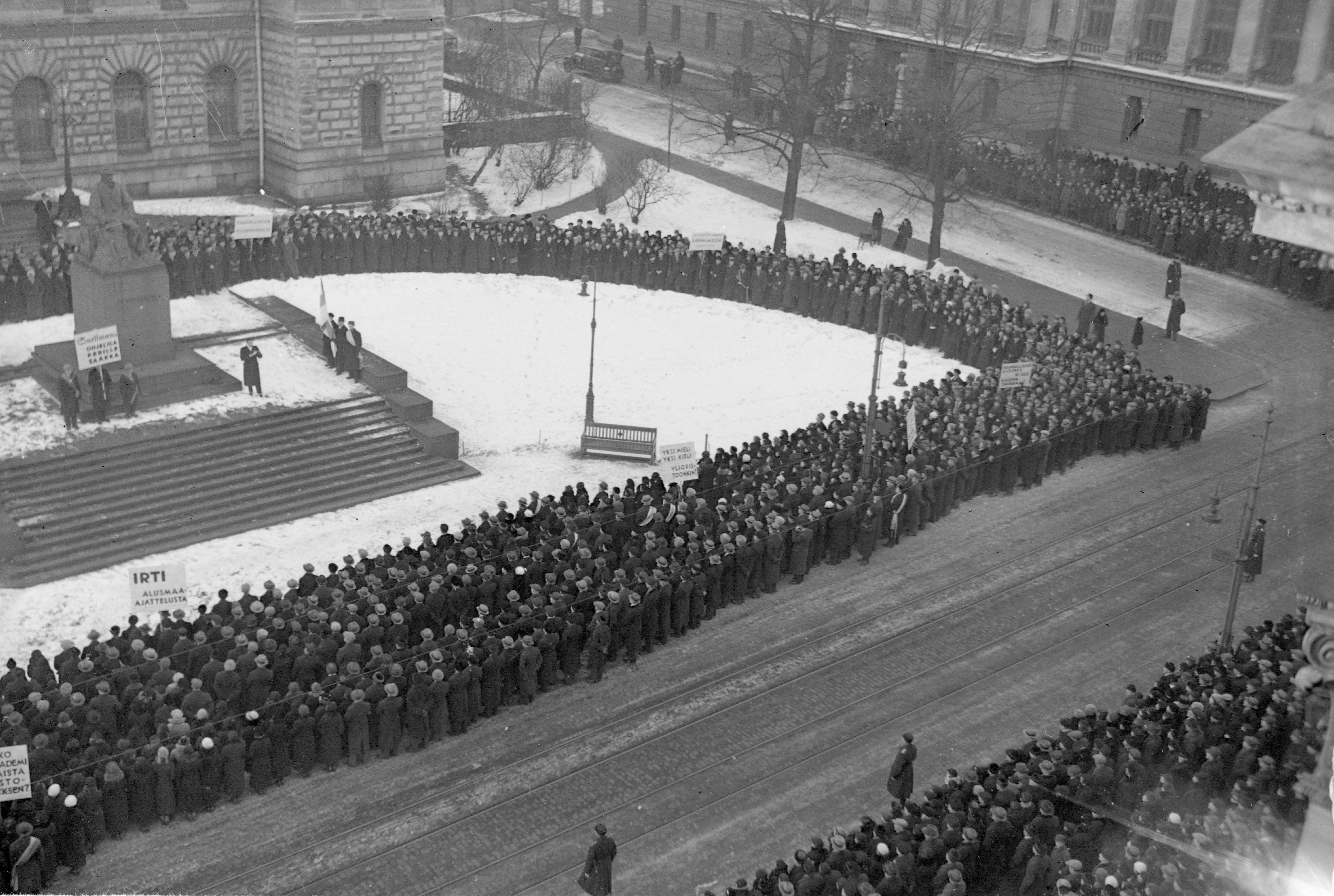 Mielenosoitus Snellmanin patsaalla Helsingin yliopiston suomenkielisyyden puolesta maaliskuussa vuonna 1935.